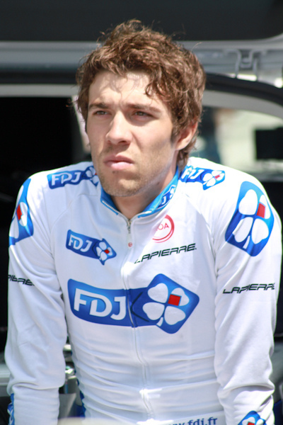 Thibault Pinot, Etape 1 (Albertville) du Critérium du Dauphiné 2011